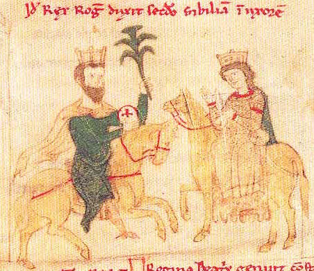 Roger II. s druhou manželkou Sibylou Burgundskou